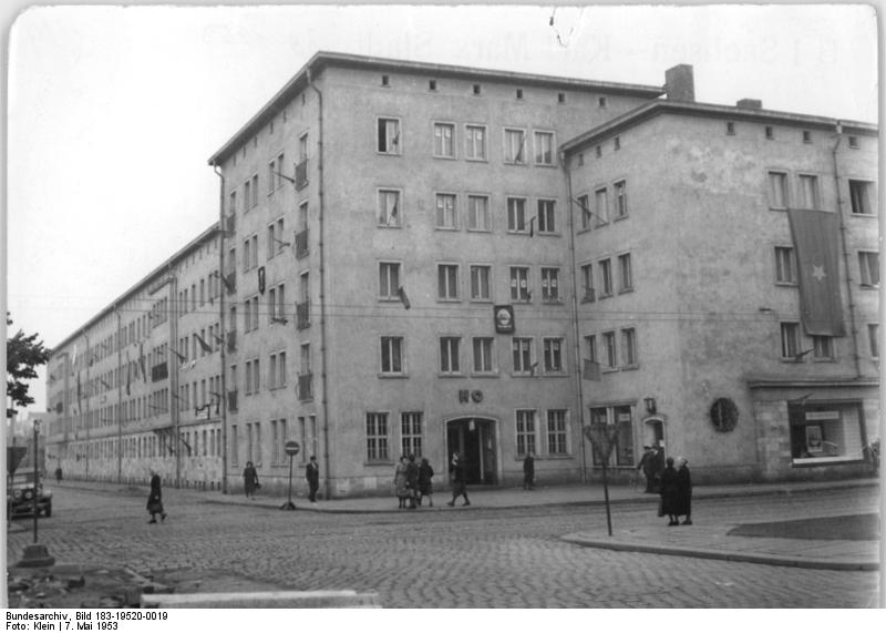 Chemnitz, Ernst-Thälmann-Straße, Handelsorganisation Zentralbild Klein XX 7.5.1953 Chemnitz wird Karl-Marx-Stadt Auf Beschluß des Ministerrates der Deutschen Demokratischen Republik wird die Arbeiterstadt Chemnitz zu Ehren des großen deutschen Arbeiterführers am 10.Mai 1953 in Karl-Marx-Stadt umbenannt. UBz: Blick auf die 1951 und 1952 in Gewölbe-Bauweise errichteten Geschäfte der Handelsorganisation in der Ernst-Thälmann-Straße.